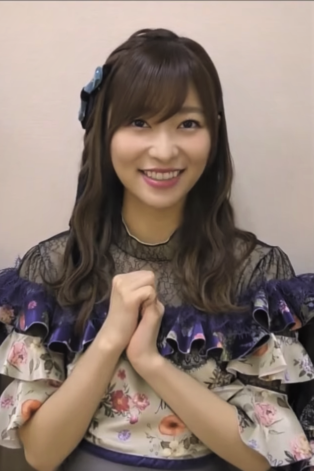 AKB48 Group大前輩 #柏木由紀 #指原莉乃 #峯岸みなみ來將經驗分享給TPE48參賽女孩們，呼籲大家要繼續支持喜歡的女孩喔！